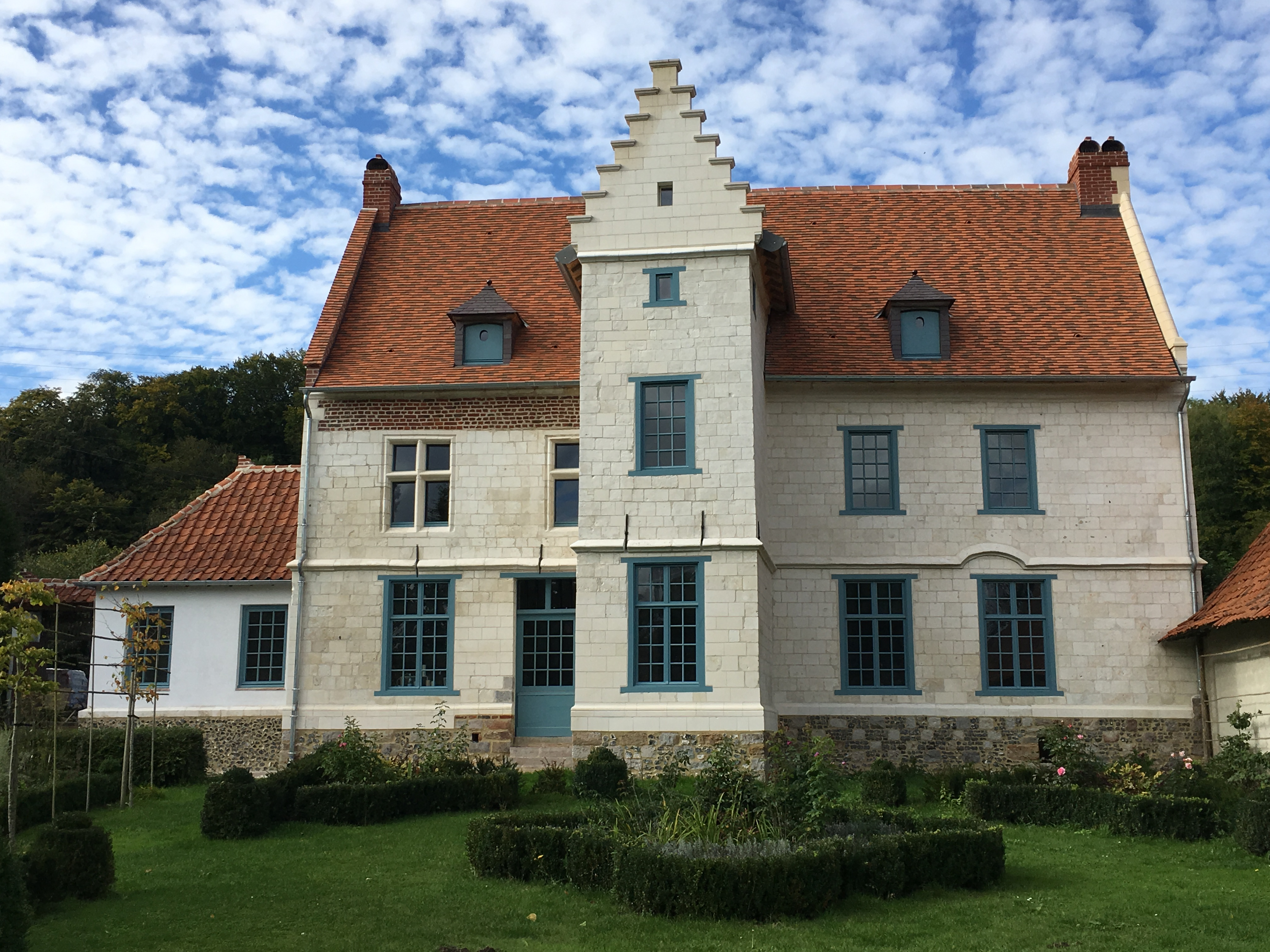 Manoir de Courcelle Rollancourt